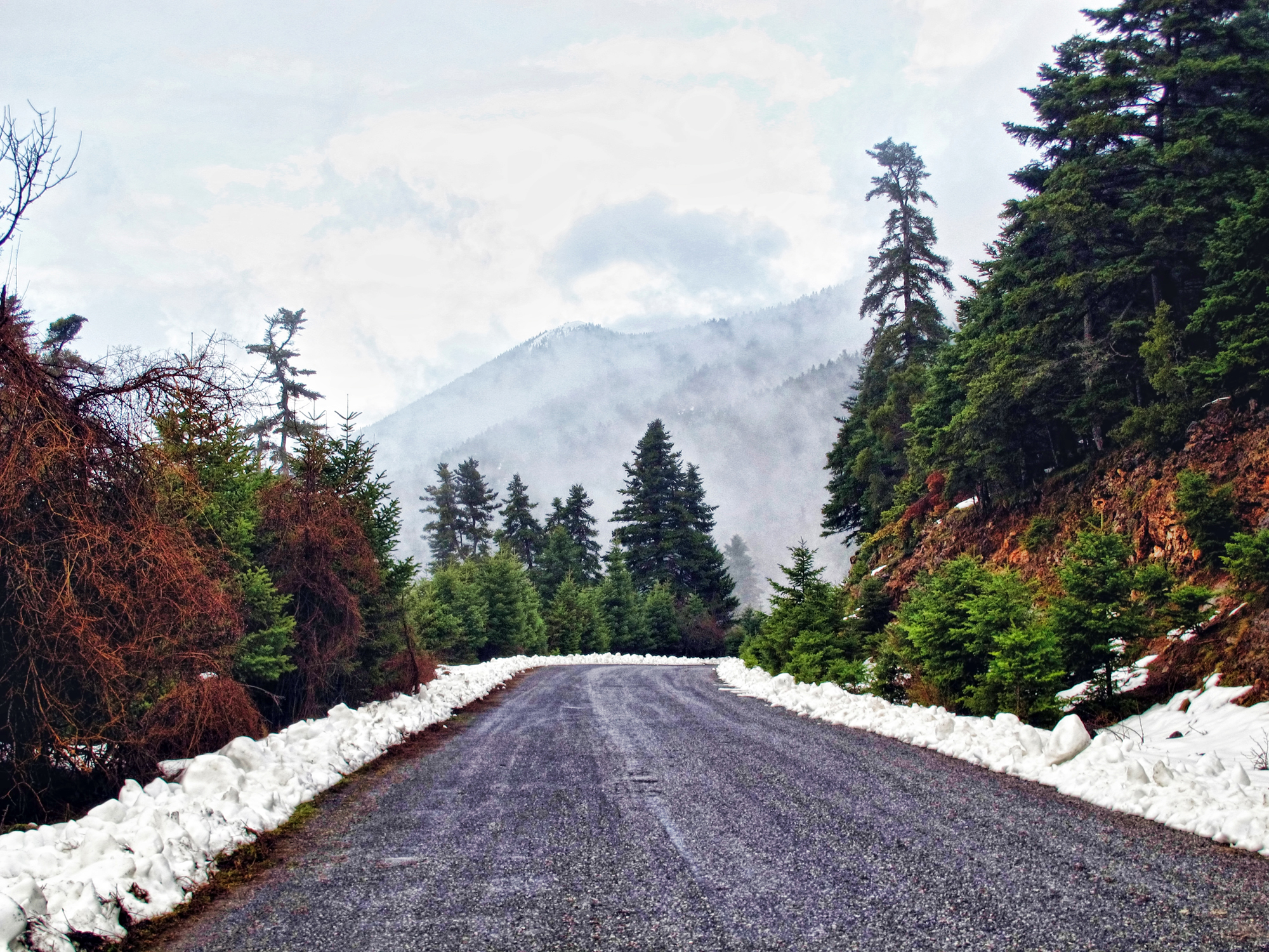 Η λήψη έγινε στη διαδρομή Αλωνίσταινα - Βυτίνα This is a photography of Natura 2000 protected area with ID GR2520001